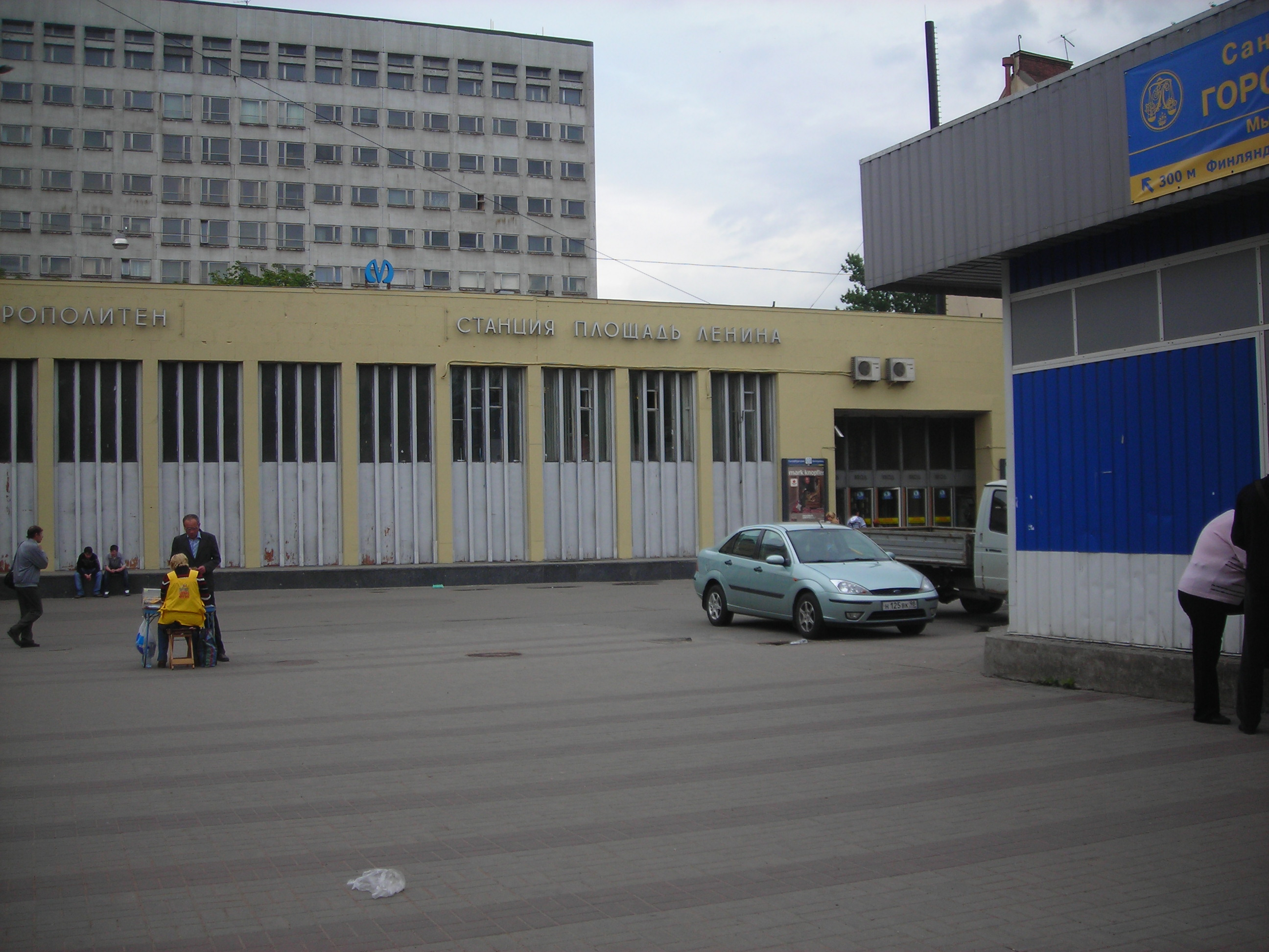 Второй вестибюль станции метро «Площадь Ленина» в Санкт-Петербурге